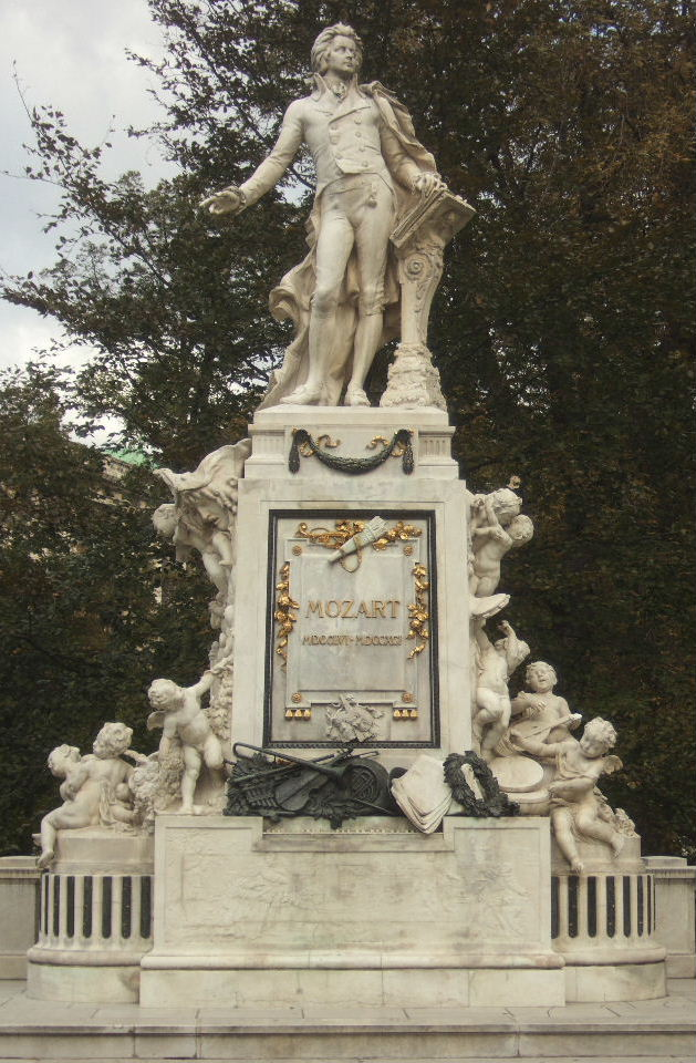 Wien: Denkmal für Wolfgang Amadeus Mozart von Viktor Tilgner (1896) - im Burggarten seit 1953